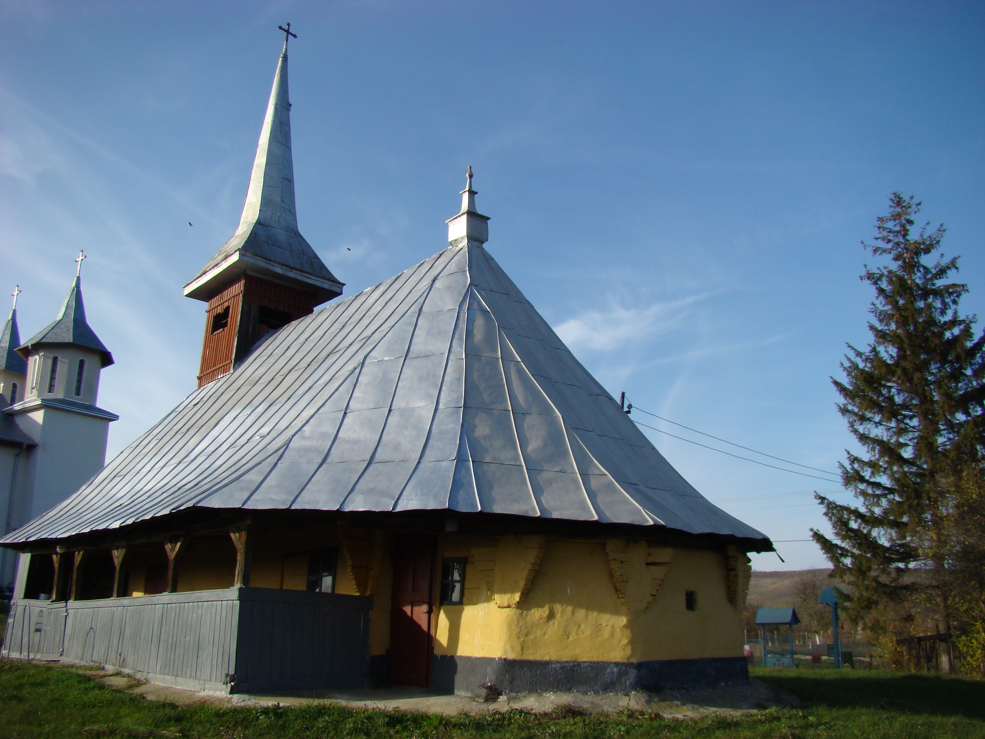 Biserica de lemn "Sf. Arhangheli Mihail şi Gavriil" , sat BERCHIEŞU; comuna FRATA